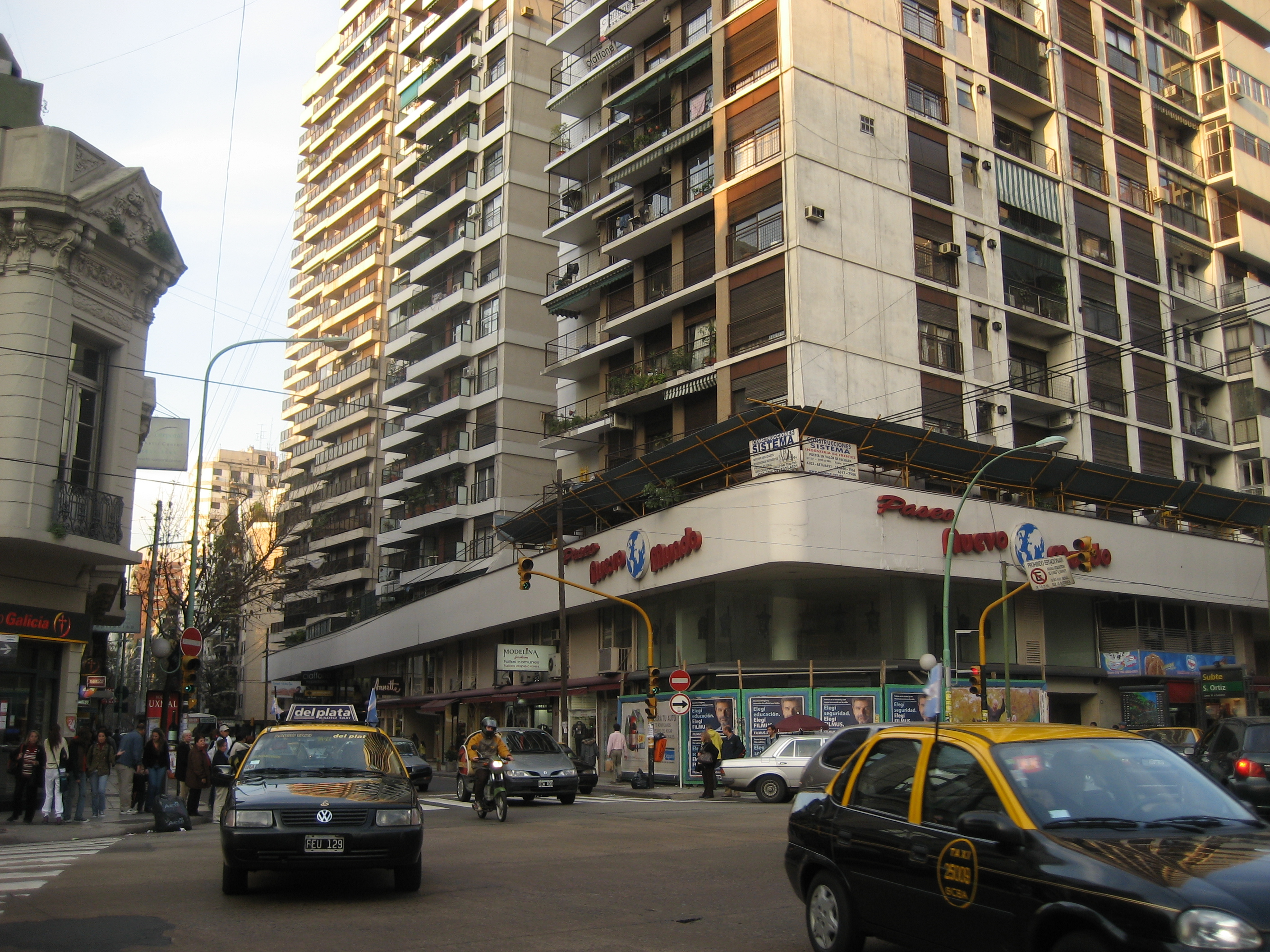 Santa Fe and Scalabrini Ortiz Avenues, Palermo, Buenos Aires.